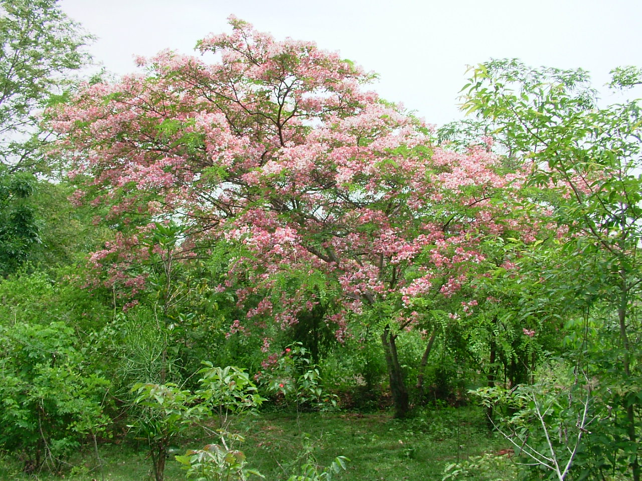 Muồng hoa đào, (Cassia javanica L); họ Đậu (Fabaceae) trong vườn cảnh Trobư